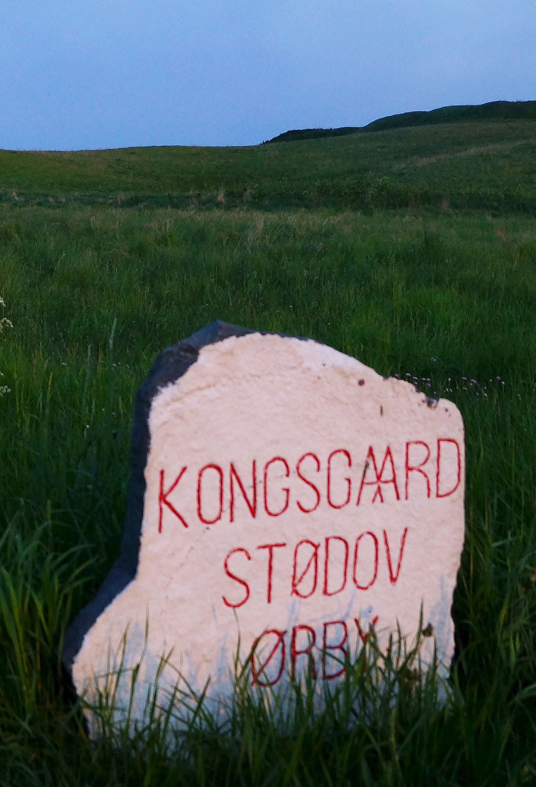 Vejvisersten ved Begtrup Vig og Dragsmur 3